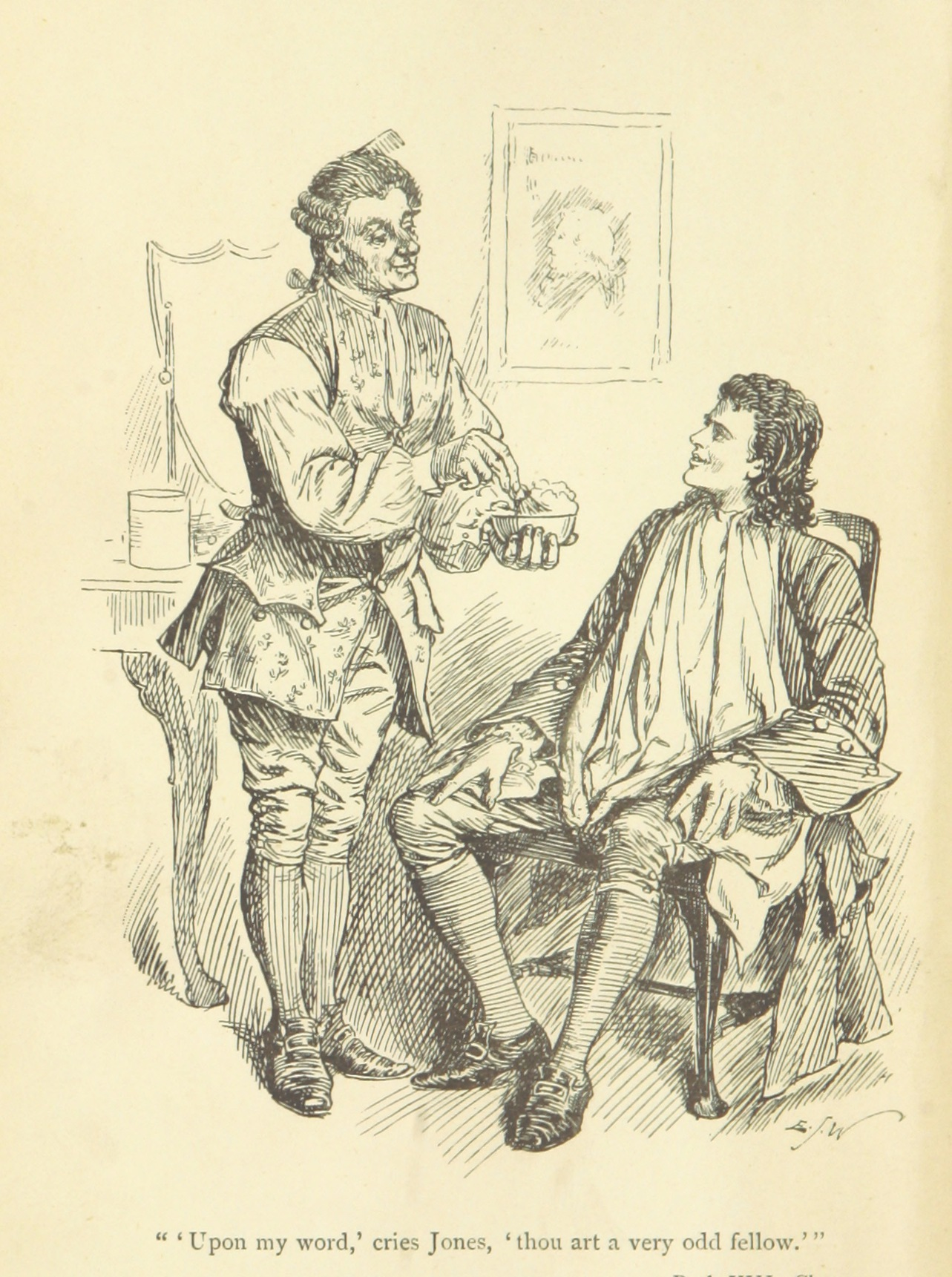 The History of Tom Jones, a foundling, (Tom Jones) Illustration pour le livre VIII, chapitre IV. Tom Jones et le barbier, Petit Benjamin, qui n'est autre que Benjamin Partridge.